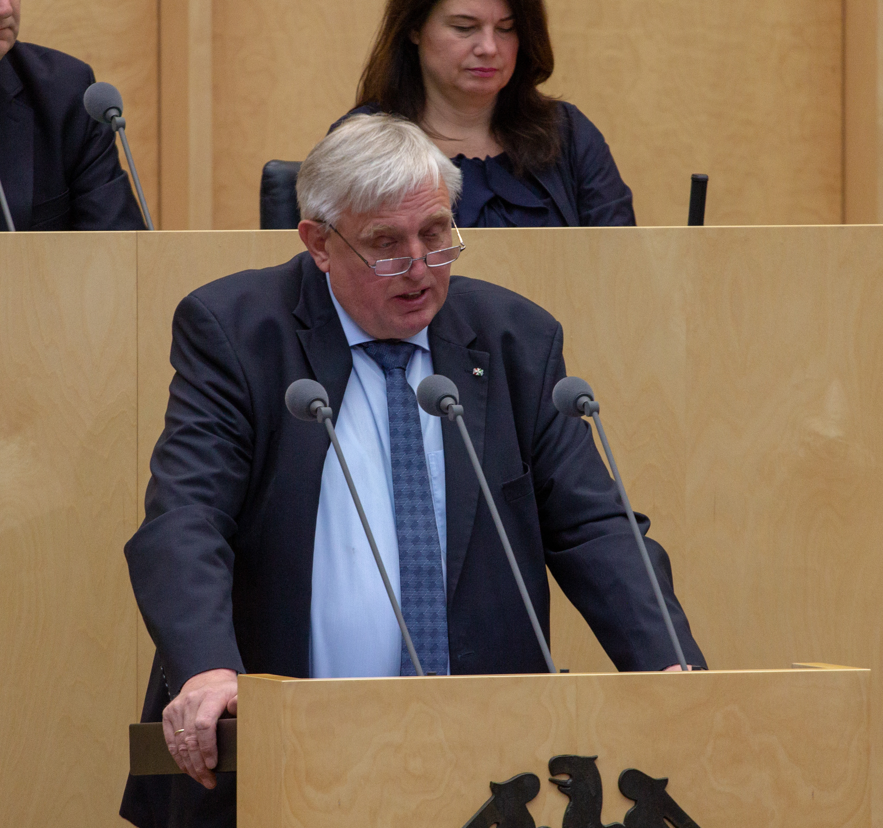 Plenarsitzung des Bundesrates am 12. April 2019 in Berlin.